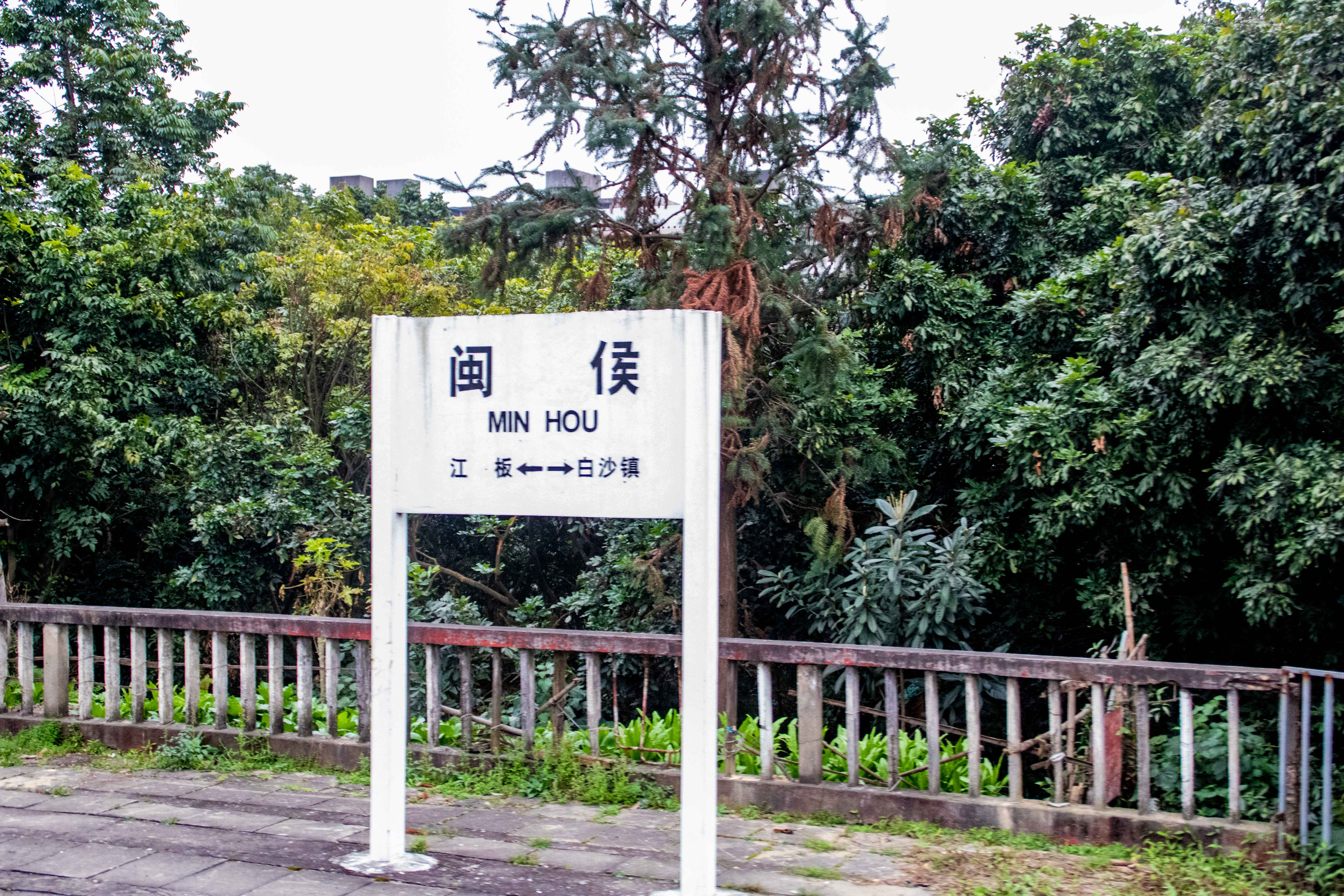 中文（中国大陆）: 闽侯站站牌